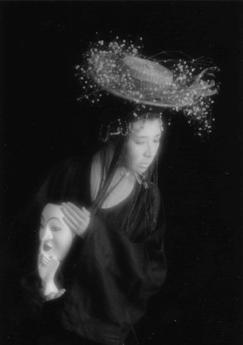 Juju Alishina à Tokyo 1993